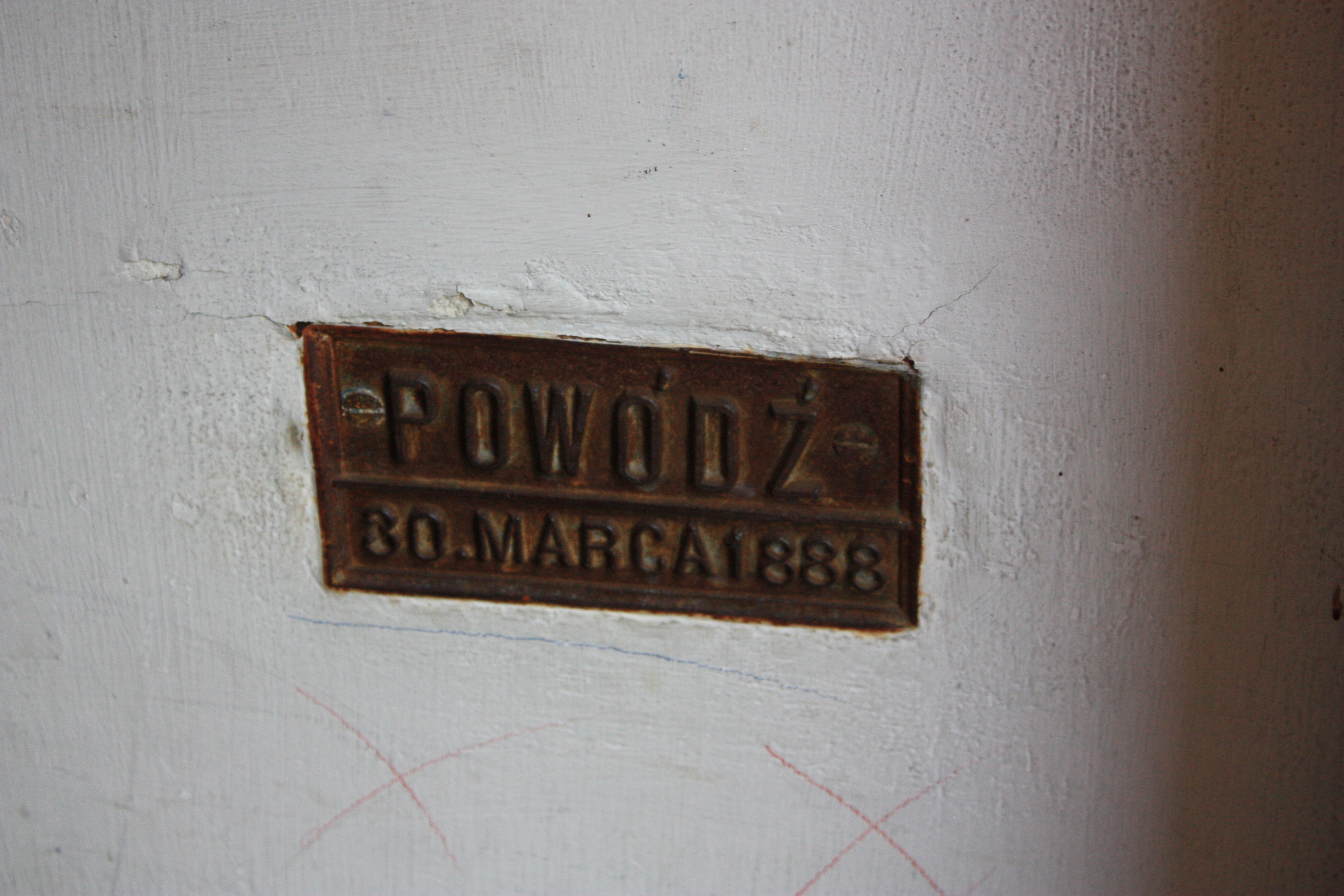 Kościół Bożego Ciała w Poznaniu. Tabliczka upamiętniająca powódź 30.03.1888.